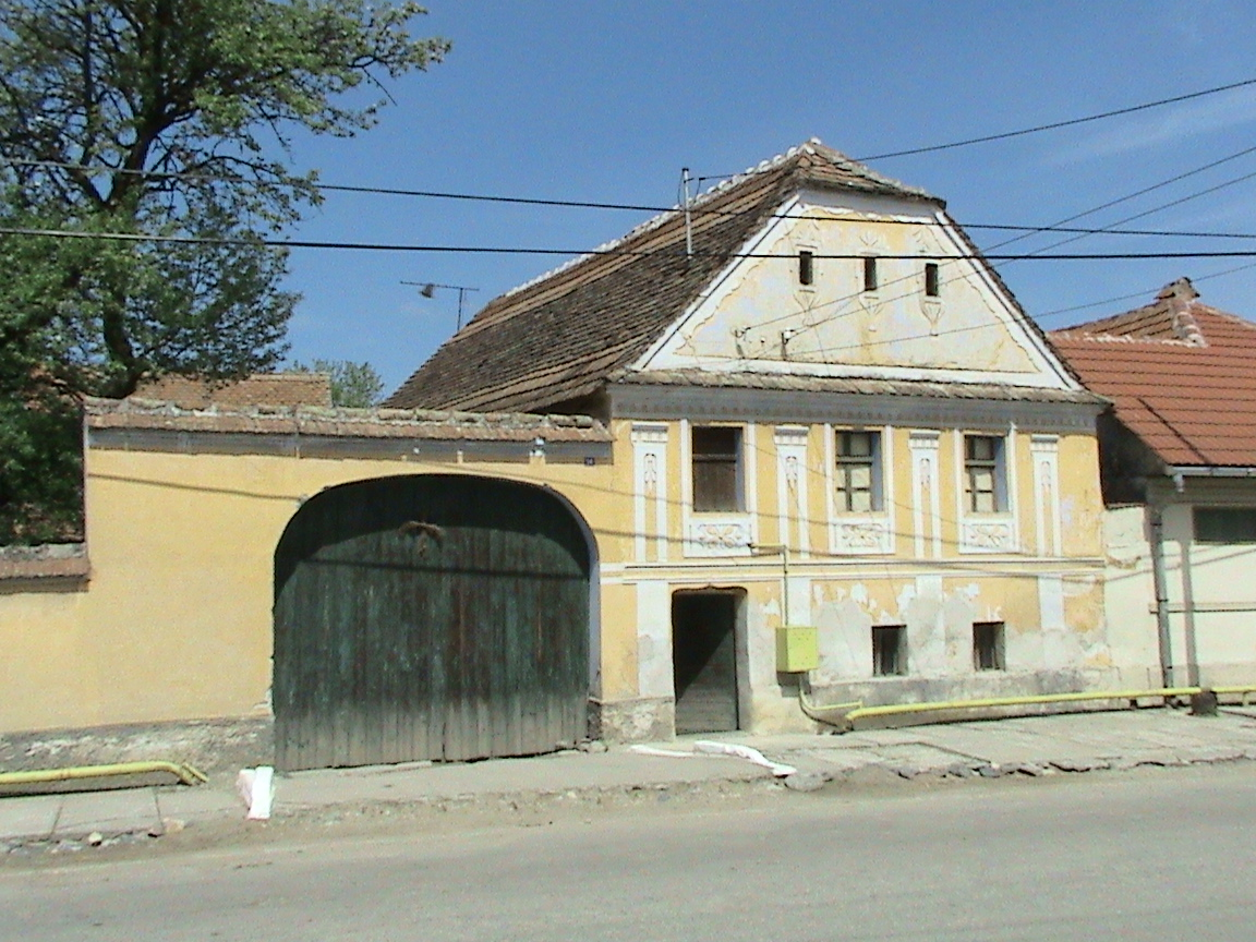 Tip de casă dintre cele două războaie mondiale, din Racoviţa, Sibiu.